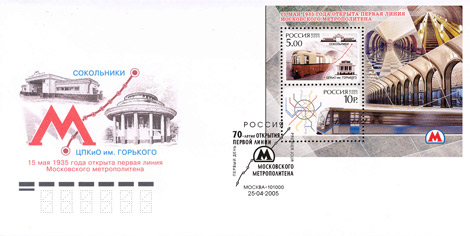 Конверт первого дня 70-летие открытия первой линии Московского метрополитена.